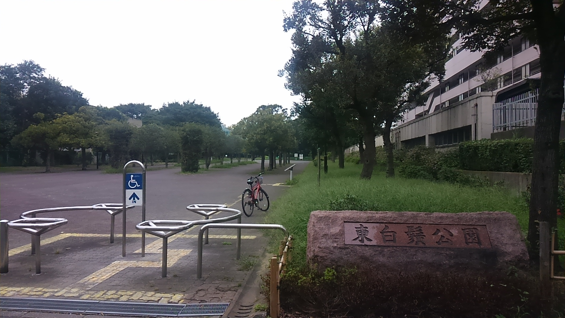 東白髭公園の南門です。